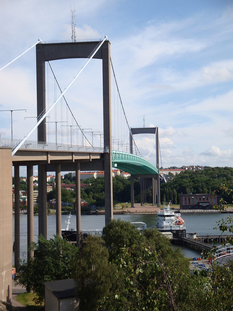 Älvsborg Bron